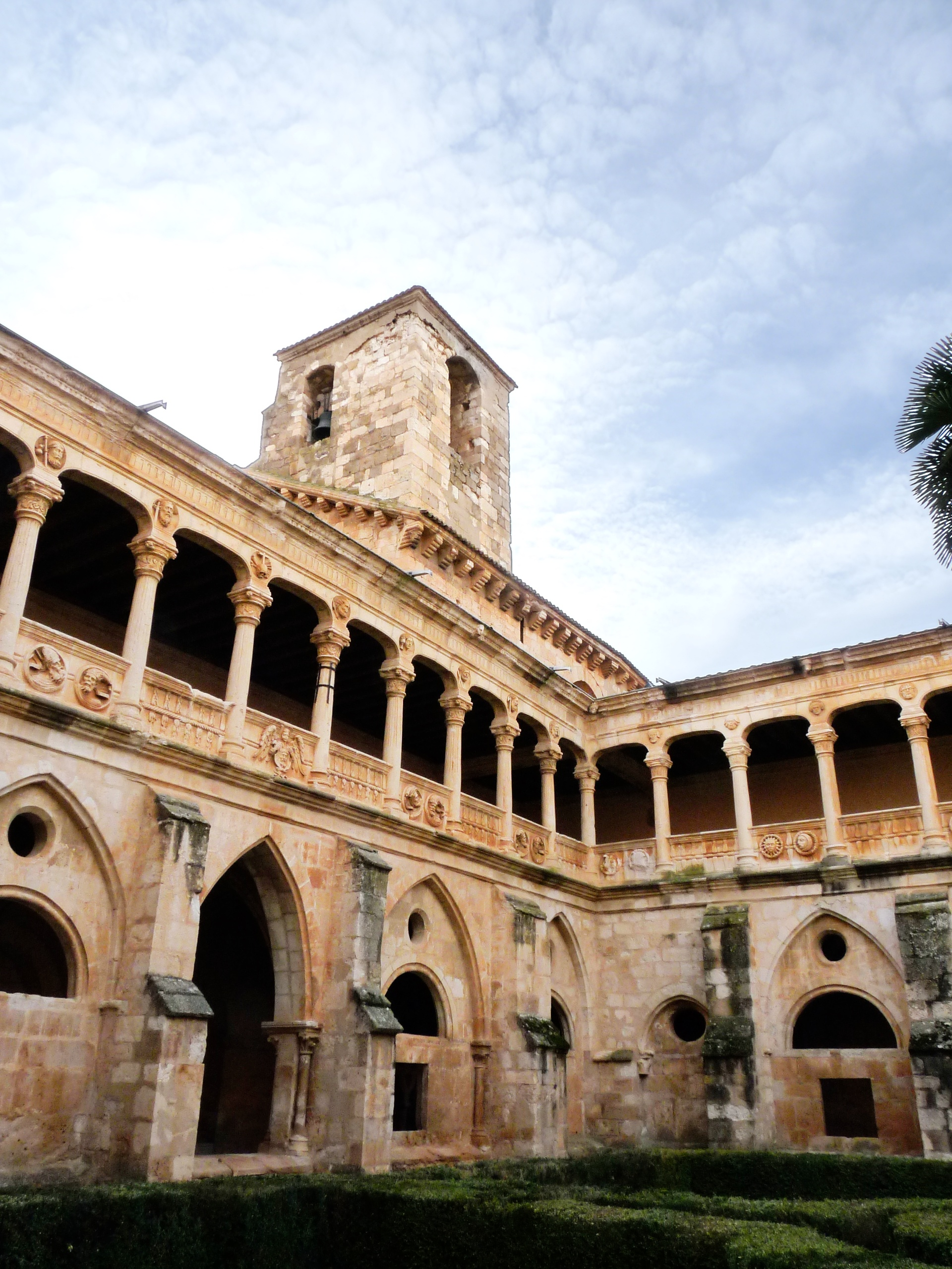 Monasterio de Santa María de Huerta - Claustro gótico/plateresco - Torre